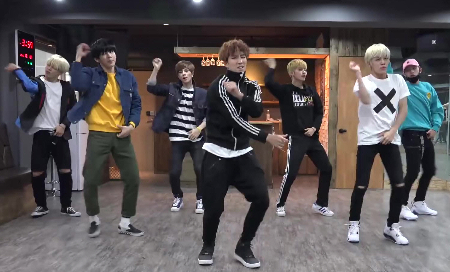 [24K(투포케이)] 4집 날라리(Superfly) 안무 영상 (사복ver.)